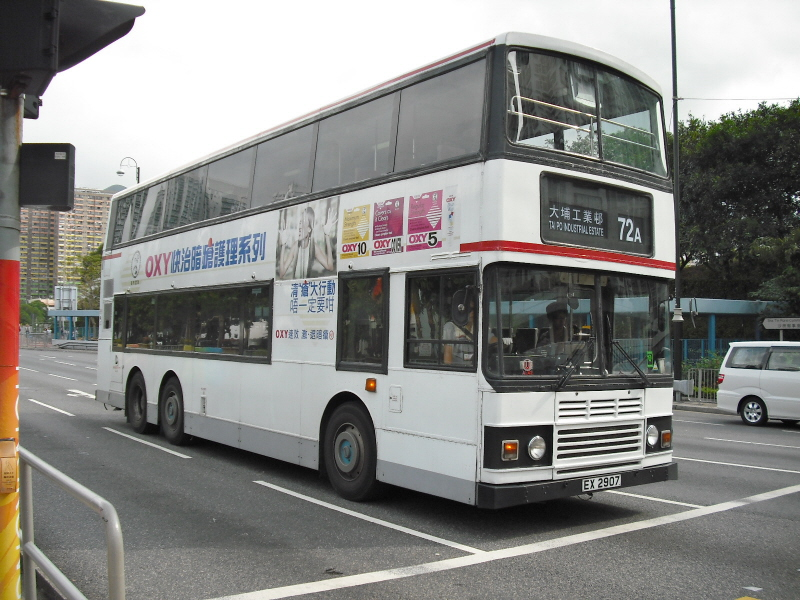 九龍巴士72A線，攝於沙田